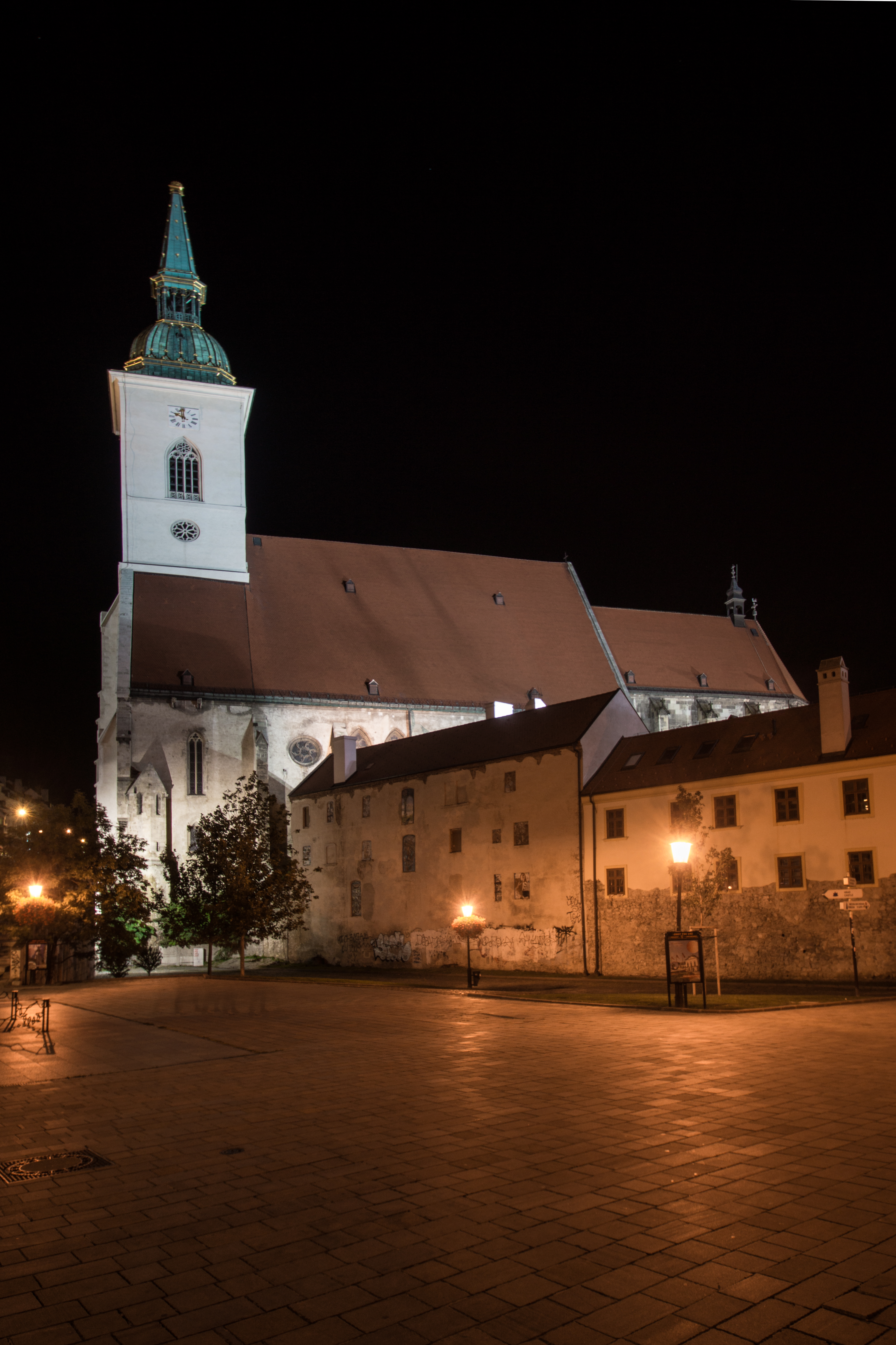 Catedral de San MartínSlovenčina: Katedrála svätého Martina